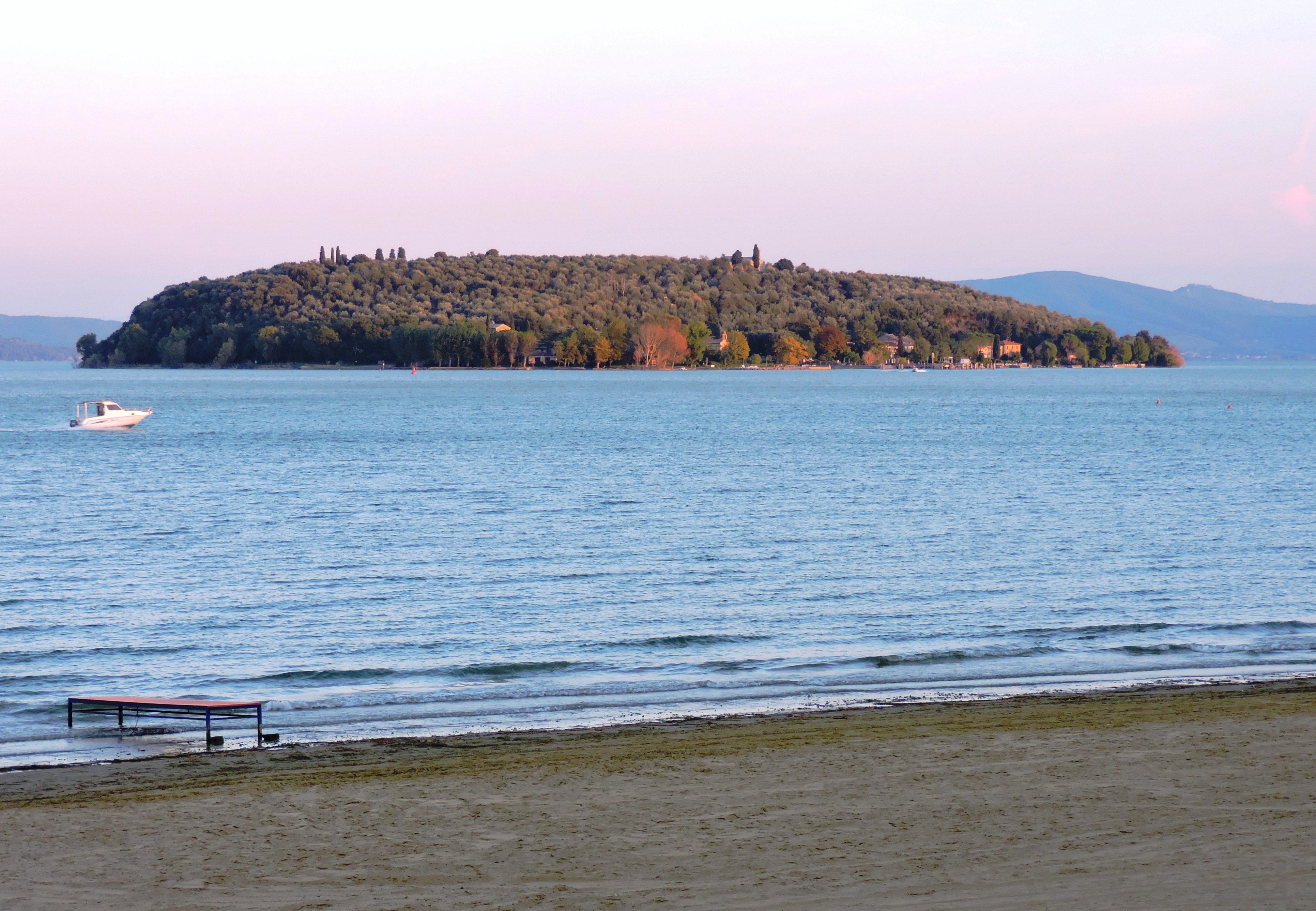 Percorso "Isola Museo" This is a photo of a monument which is part of cultural heritage of Italy.